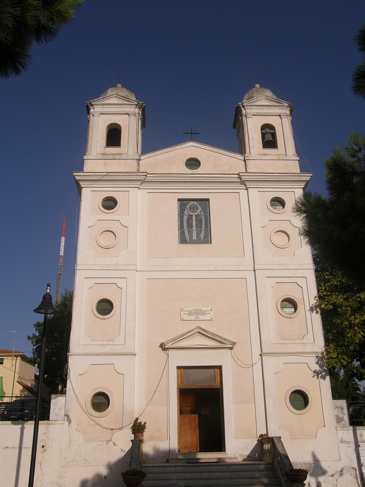 Pescara